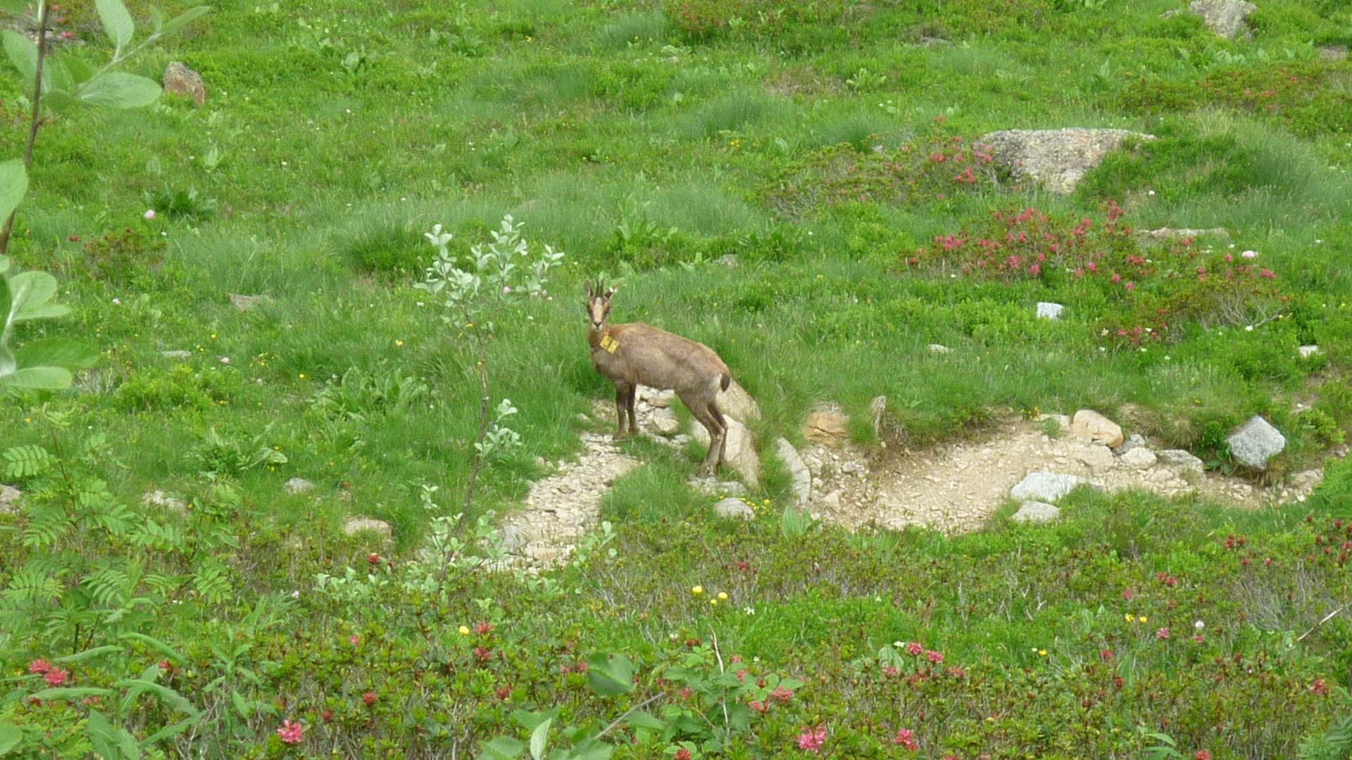 isard de la réserve nationale de chasse d'Orlu. Cet isard est marqué au moyen d'un collier permettant d'en assurer le suivi